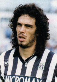 Walter Jr Casagrande con la maglia dell'Ascoli Licensing Casagrande, Walter